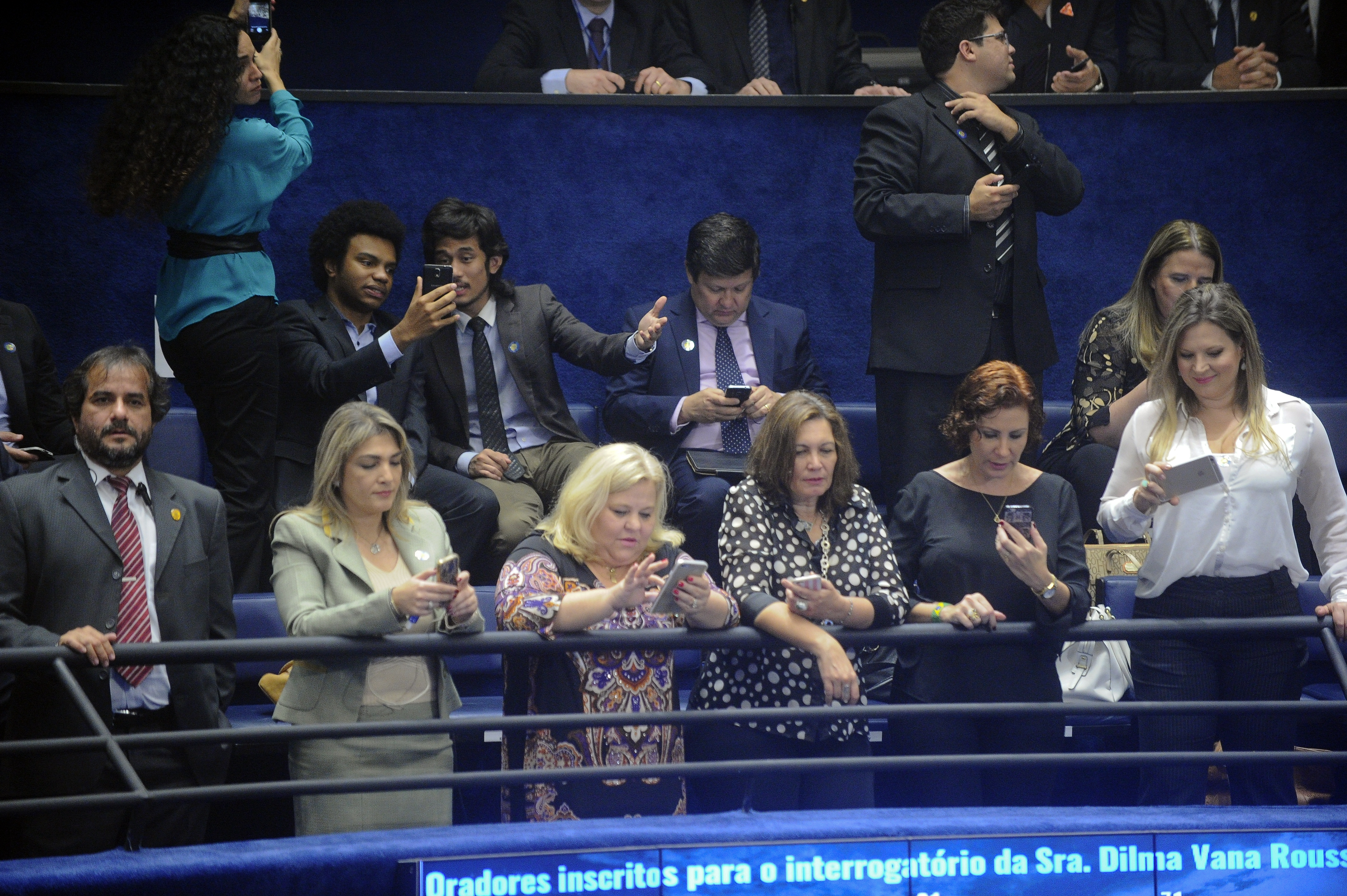 Plenário do Senado Federal durante sessão deliberativa extraordinária para votar a Denúncia 1/2016, que trata do julgamento do processo de impeachment da presidente afastada Dilma Rousseff por suposto crime de responsabilidade. Em destaque, líderes do Movimento Brasil Livre (MBL), Fernando Holiday e Kim Kataguiri. Foto: Marcos Oliveira/Agência Senado